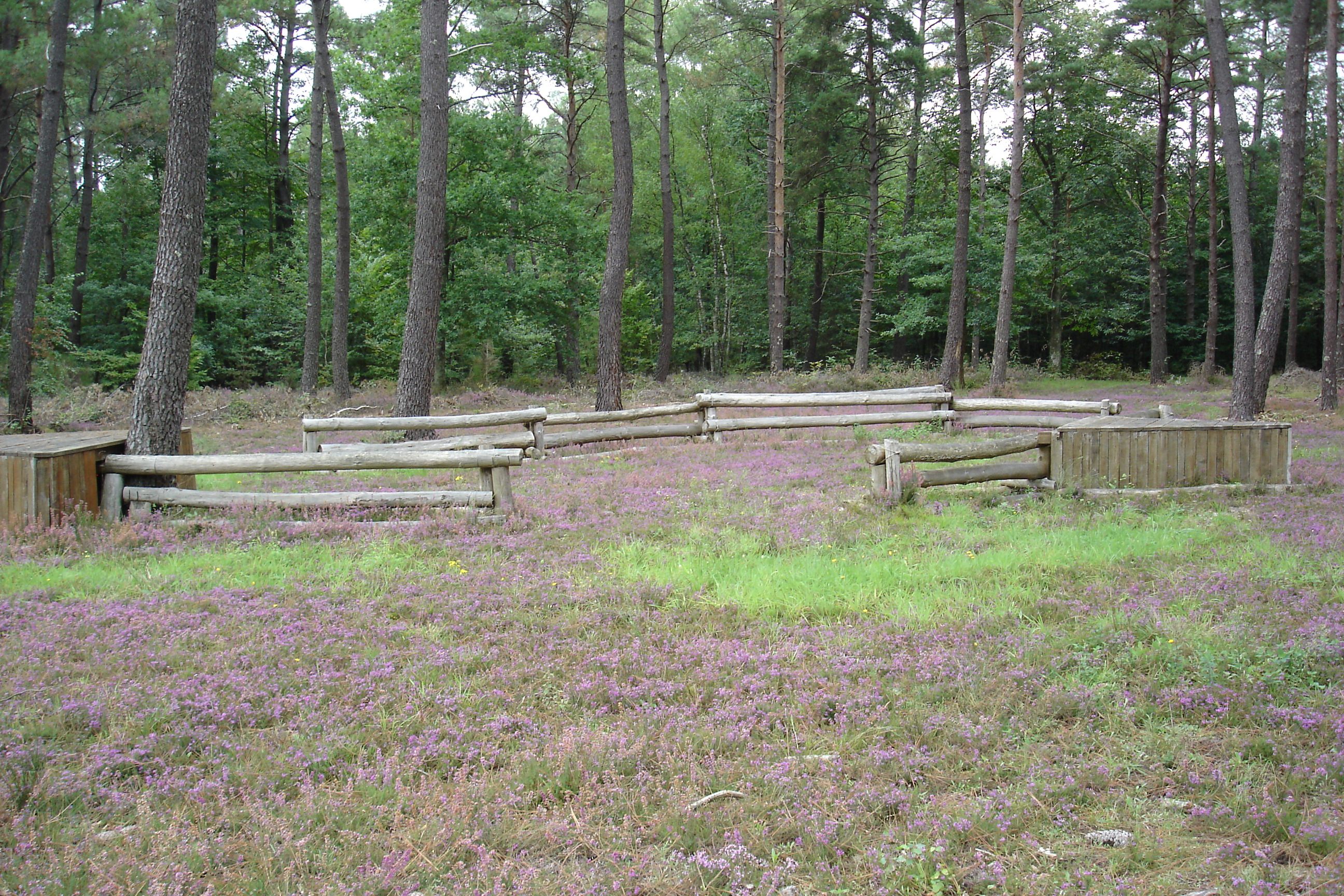 un parc-à-mouton, un obstacle en CCE